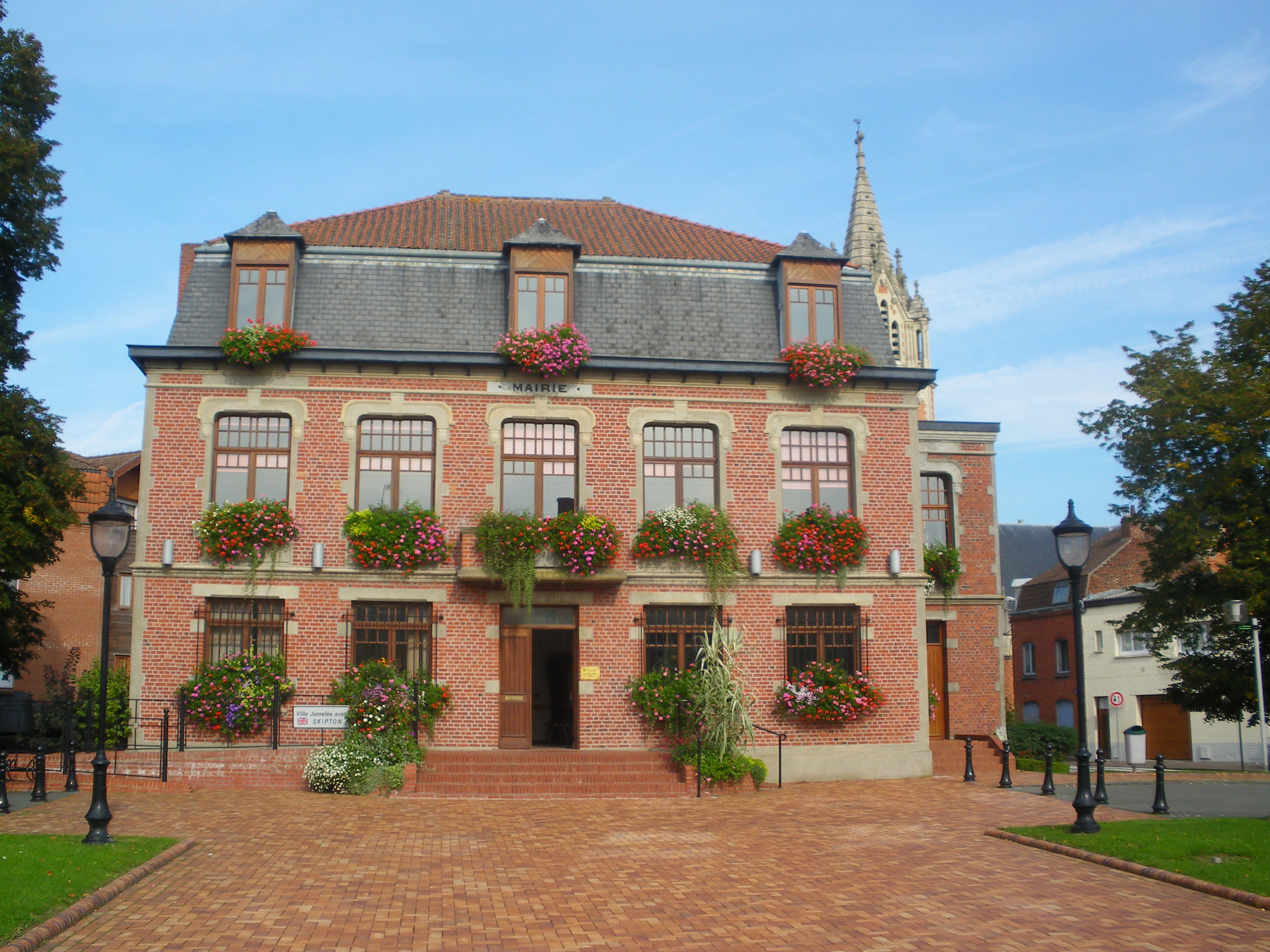 Vue de la mairie d'Erquinghem-Lys.